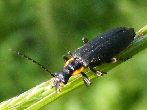 Cantharide émarginé Podabrus diadema. Photographié dans la région montréalaise le 28 juin 2010, sur Fujifilm FinePix S700.